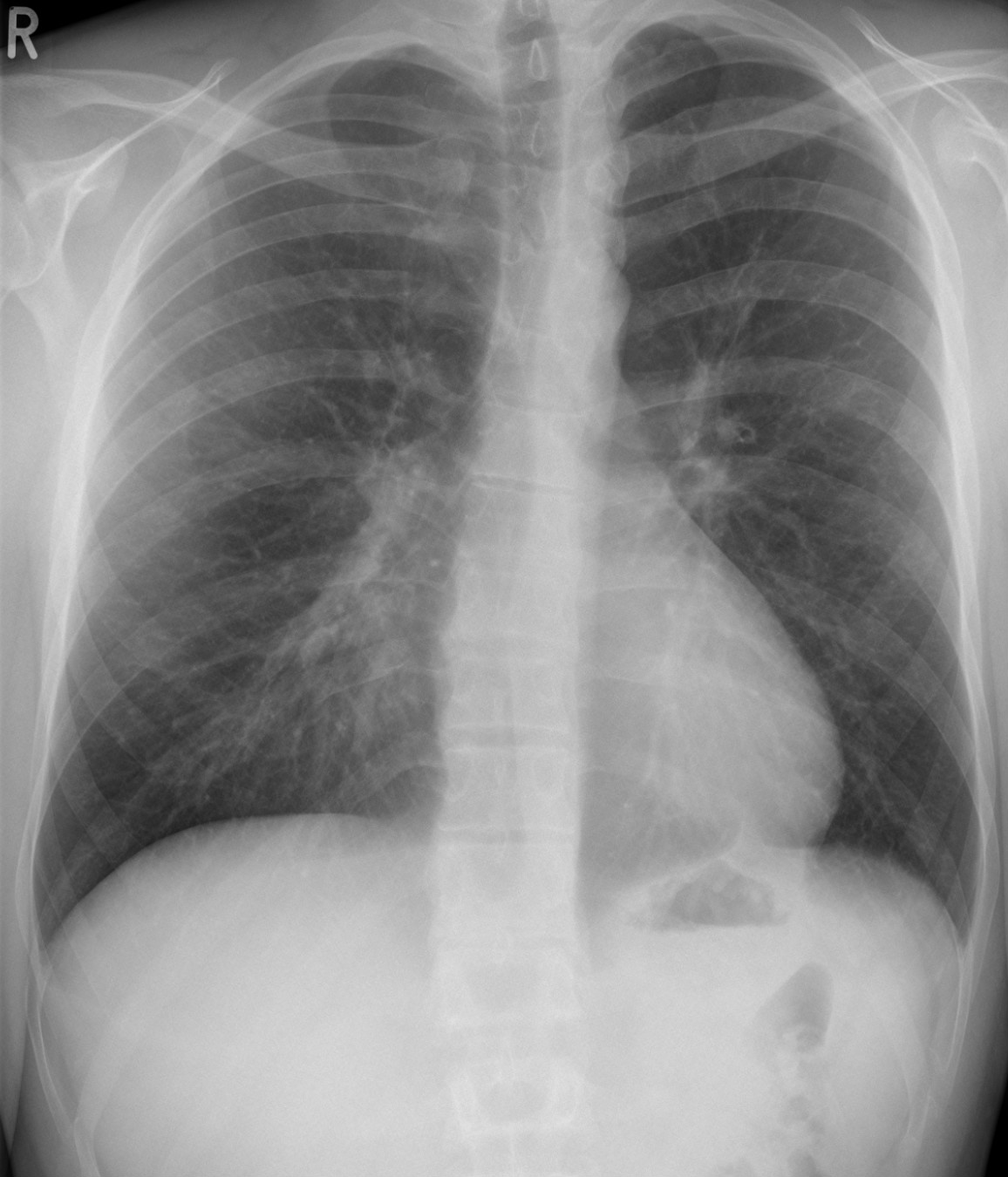 Trichterbrust in der Röntgenaufnahme PA mit Verlagerung des Herzschattens nach links und verdichteter Darstellung der Unterlappengefäße rechts.